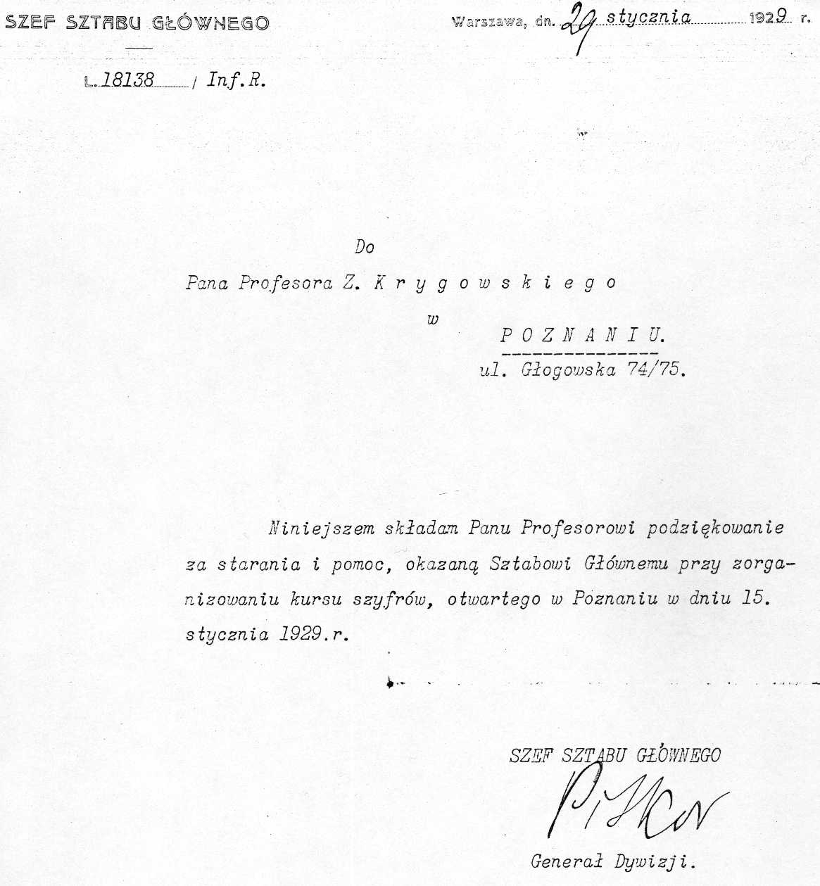 Fotokopia podziękowania z podpisem gen. Piskora ze Sztabu Głównego WP dla prof. Zdzisława Krygowskiego na Uniwersytecie Poznańskim.